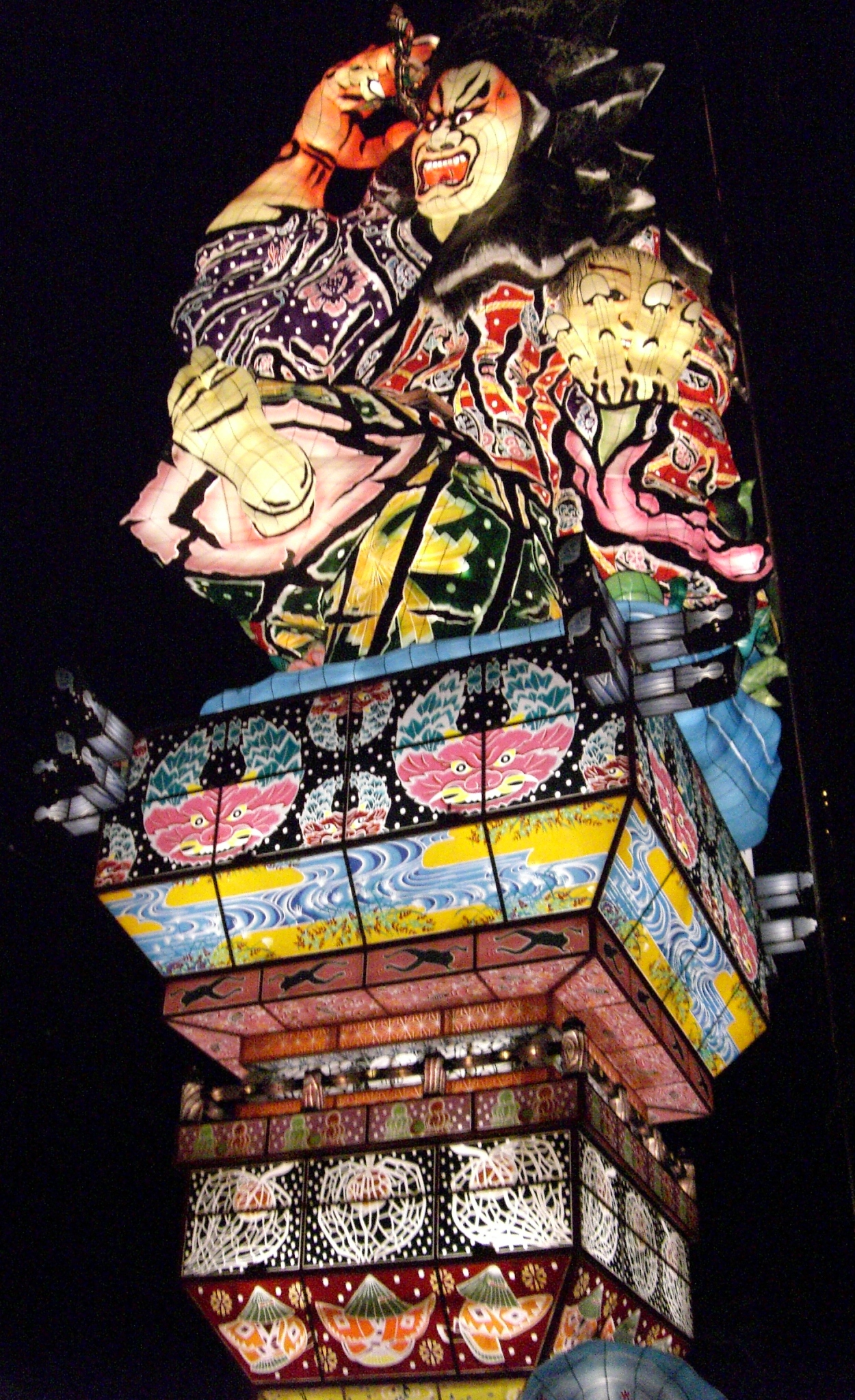 五所川原立佞武多 芽吹き心荒ぶる（めぶきうらさぶる）2007年製作